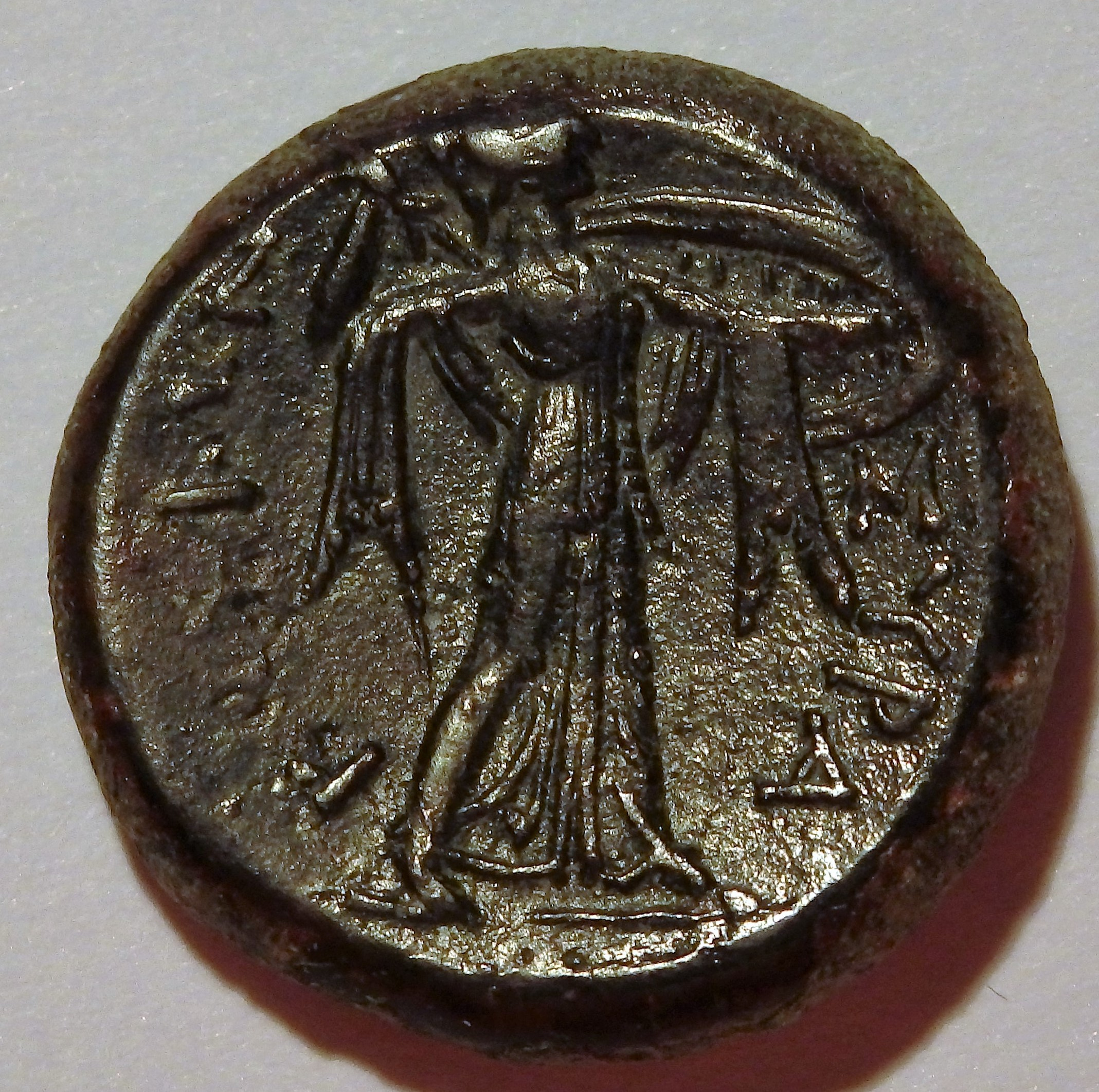 Rückseite: Athena hält Blitz wie Speer und einen Schild, BMC 503, ca. 23 mm Durchmesser